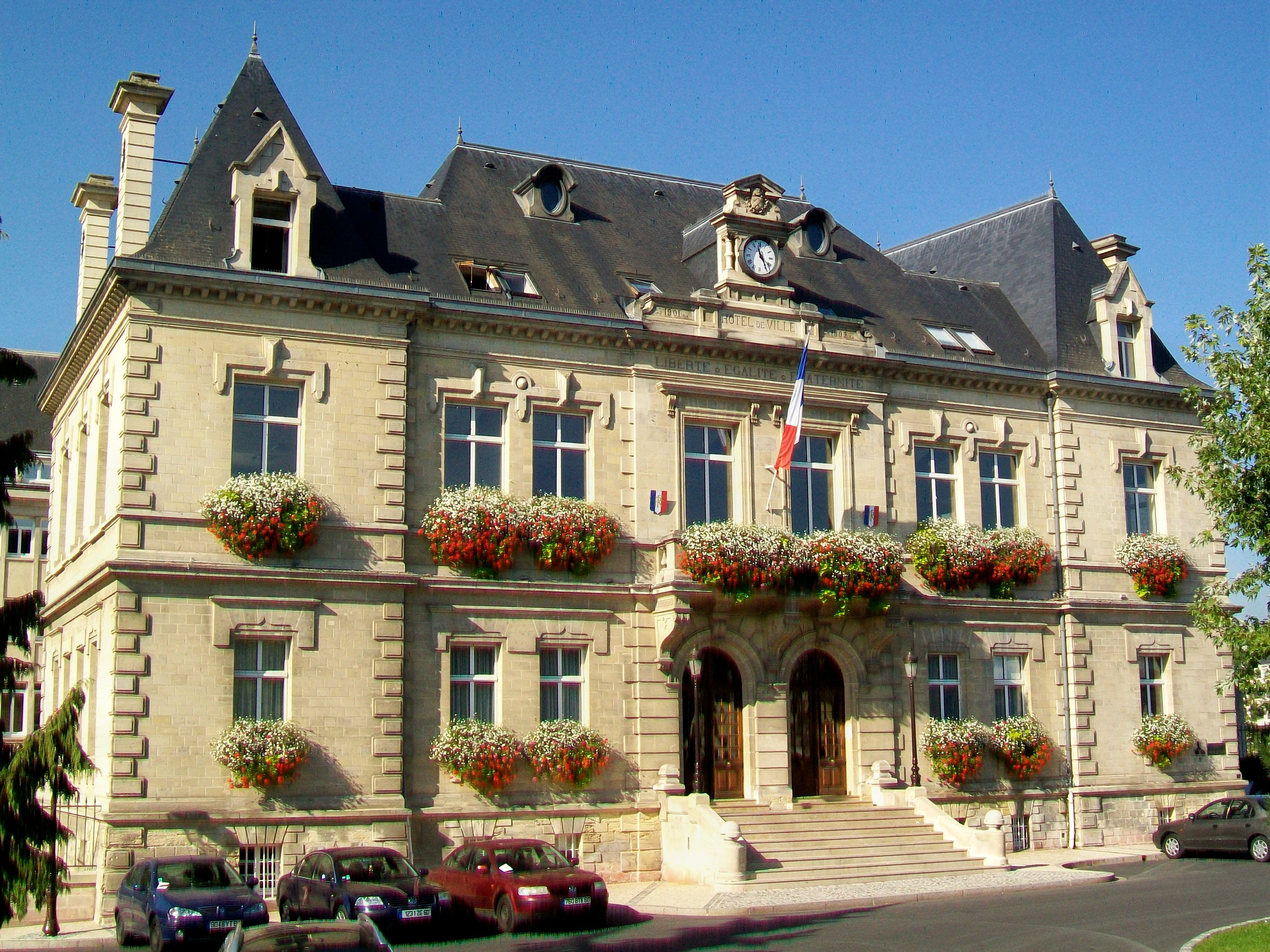 L'hôtel de ville de Creil, inauguré en 1903, sur l'île Saint-Maurice.